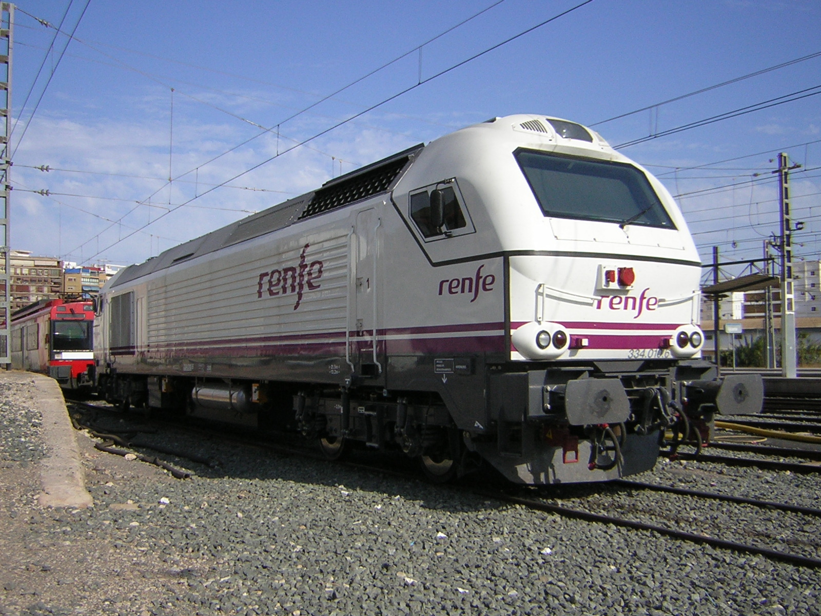 Locomotora de la Serie 334 de Renfe estacionada en la estación de Alicante-Término